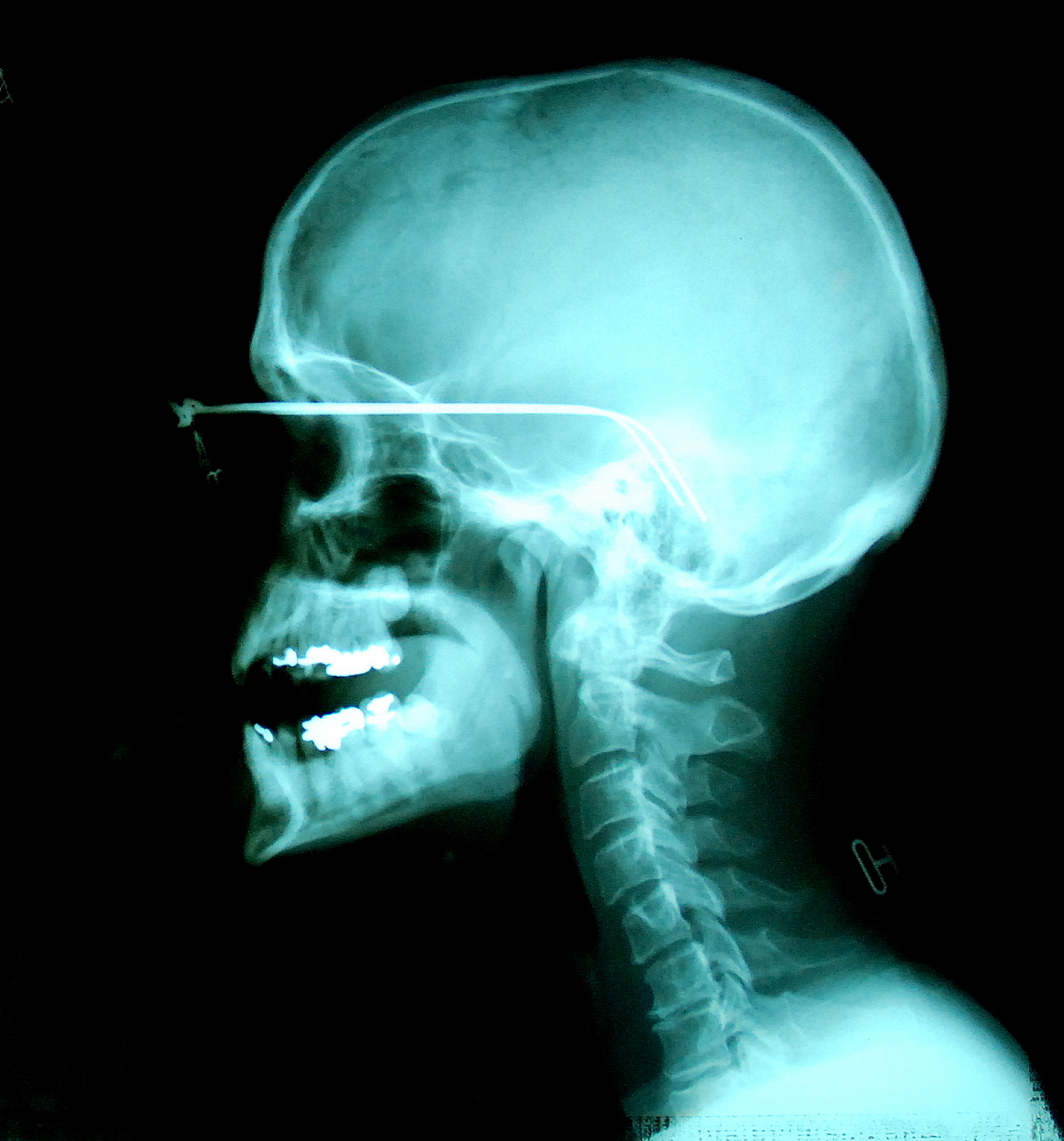 Röntgenfoto van een hoofd van een brildrager in het Museum Dr. Guislain te Gent (België)